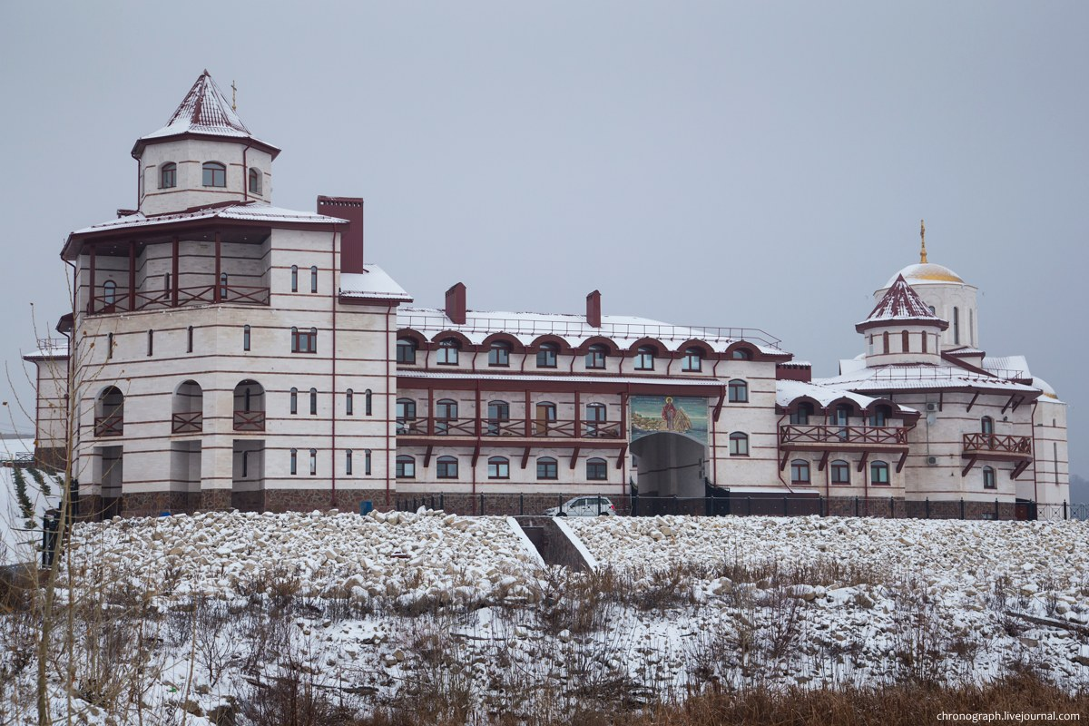 Вид на Свято-Богородицкий Казанский мужской монастырь. Винновка, Ставропольский район Самарской области